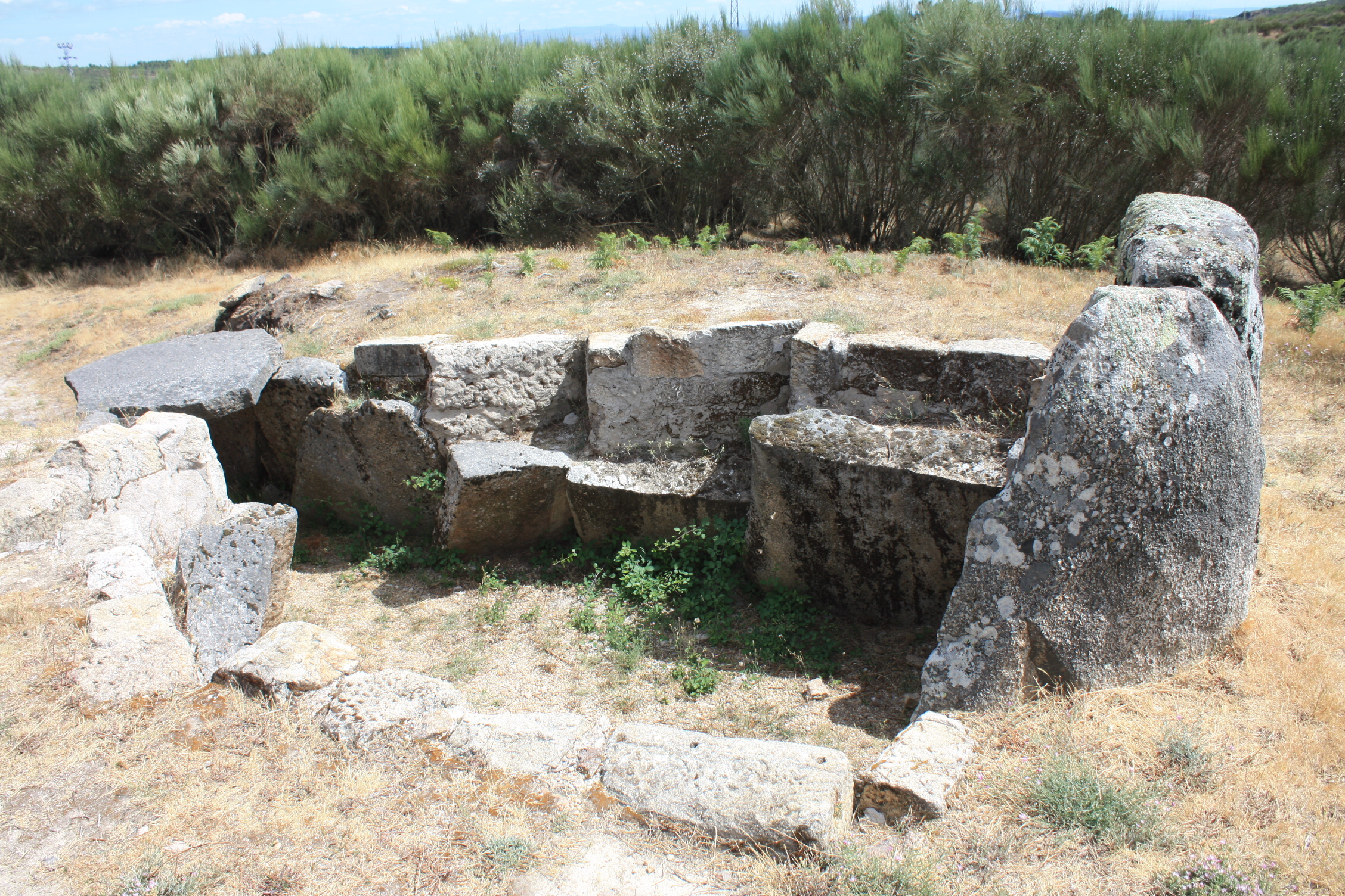 Mamoa das Madorras - mamoa em Sabrosa, Portugal Cultural property Mamoa das Madorras, São Martinho de Anta, São Martinho de Antas e Paradela de Guiães, Sabrosa, Vila Real District, Portugal Q66815341, SIPA ID: 34629, DGPC ID: 74047 Wiki Loves Monuments ID: DGPC-74047